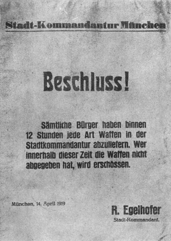 Anschlag: “Stadt-Kommandantur München — Beschluss! Sämtliche Bürger haben binnen 12 Stunden jede Art Waffen in der Stadtkommandantur abzuliefern. Wer innerhalb dieser Zeit die Waffen nicht abgegeben hat, wird erschossen.” München, 14. April 1919. R. Egelhofer Stadtkommandant. (Zeit der Zweiten Münchner Räterepublik).